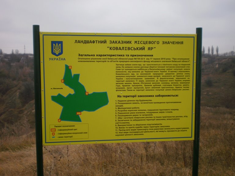 Ентомологічний-заказник-місцевого-значення-«Ковалівський-яр»